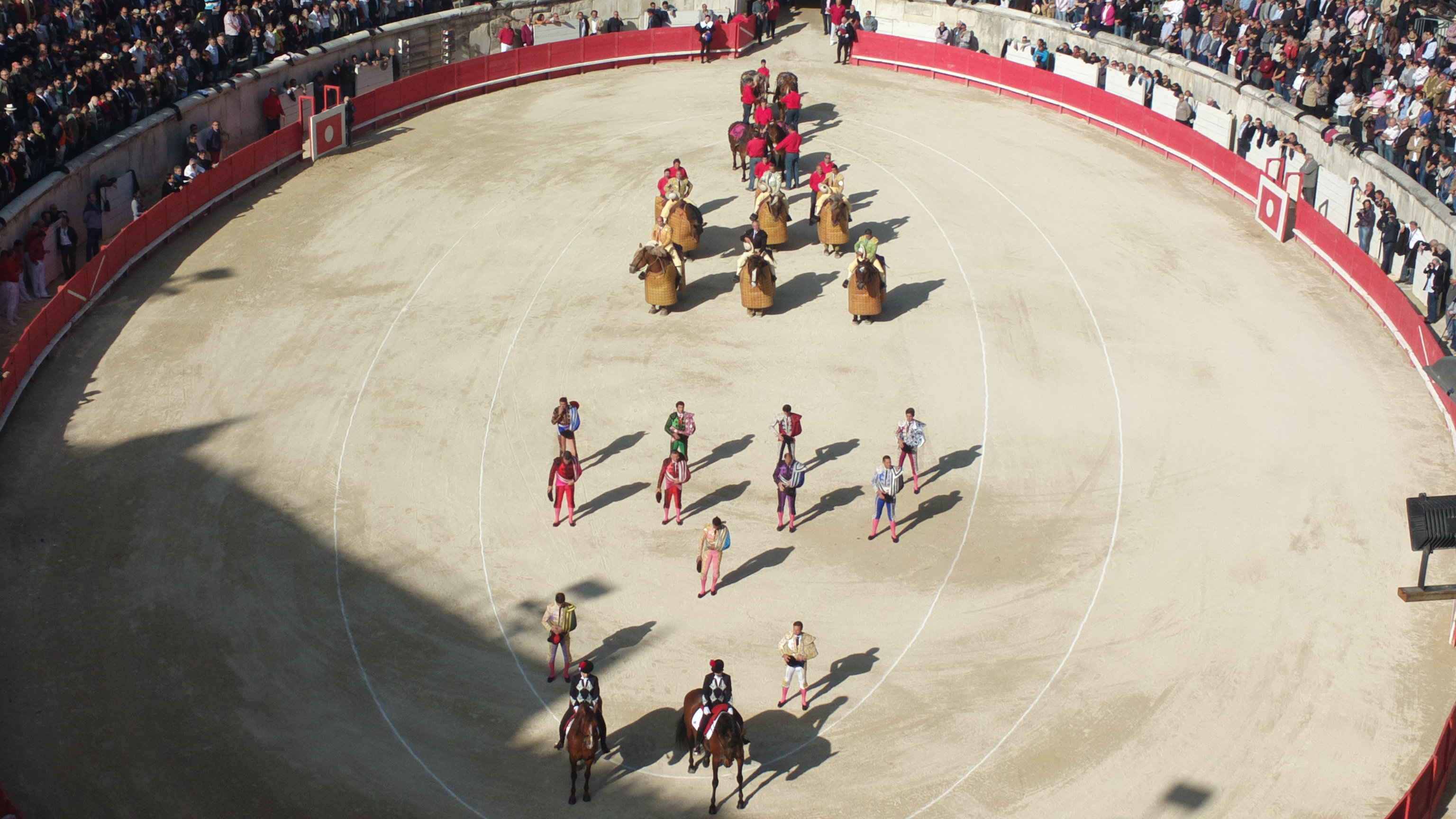 Quadrillo entrant dans les arènes lors de la Feria de Nîmes 2013